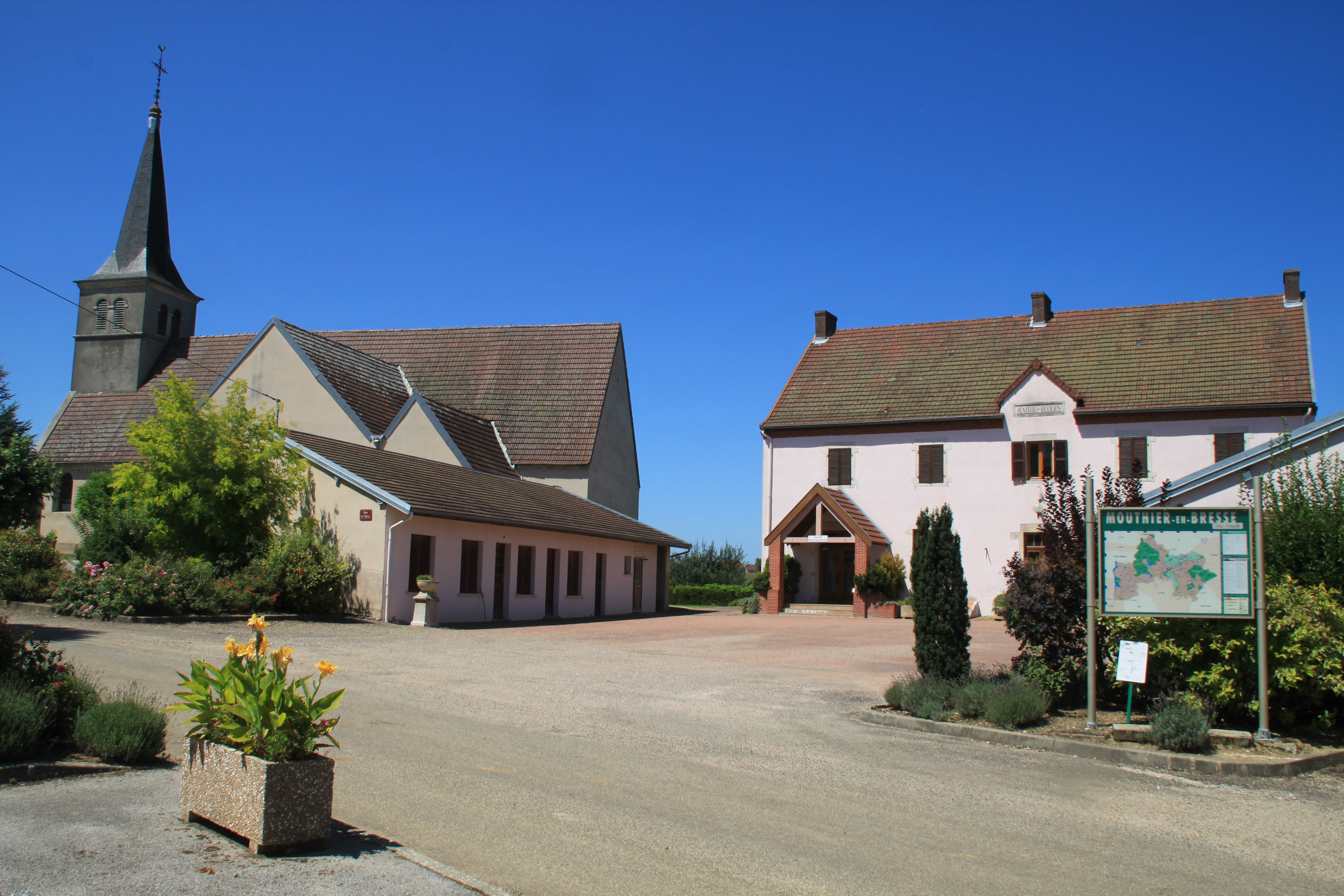 Mouthier-en-Bresse Kirche und Mairie im Dorfzentrum